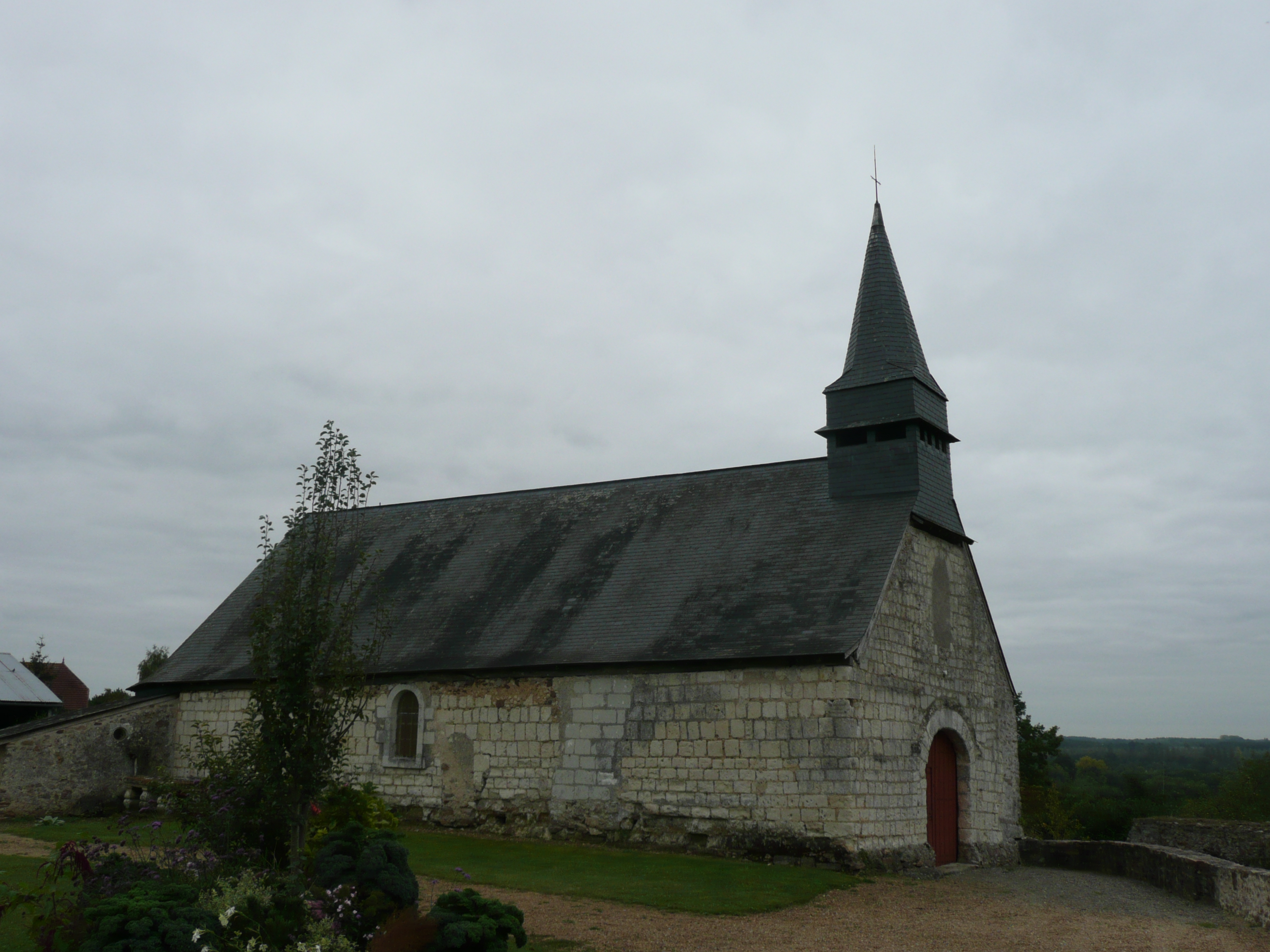 Soucelles - Chapelle de la Roche-Foulques .